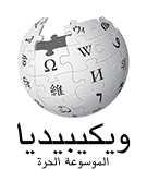 Wikipedia logo 2.0 (ar)